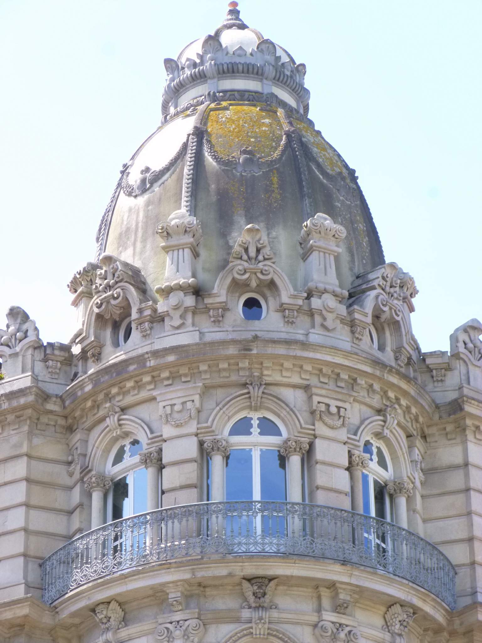 Vigo - Edificio Bonín